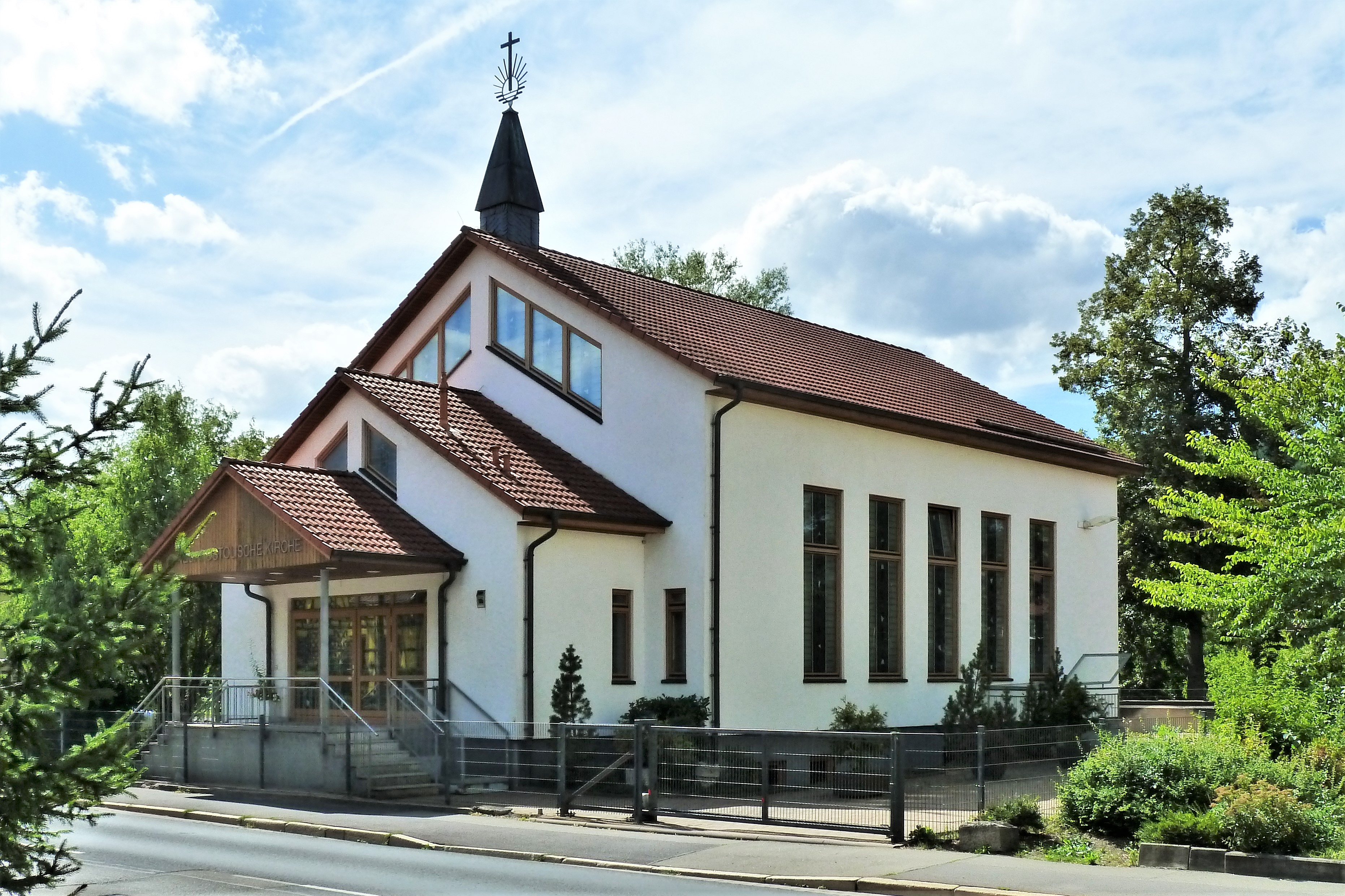 Im Jahr 2000 erbaute Neuapostolische Kirche in Meiningen.